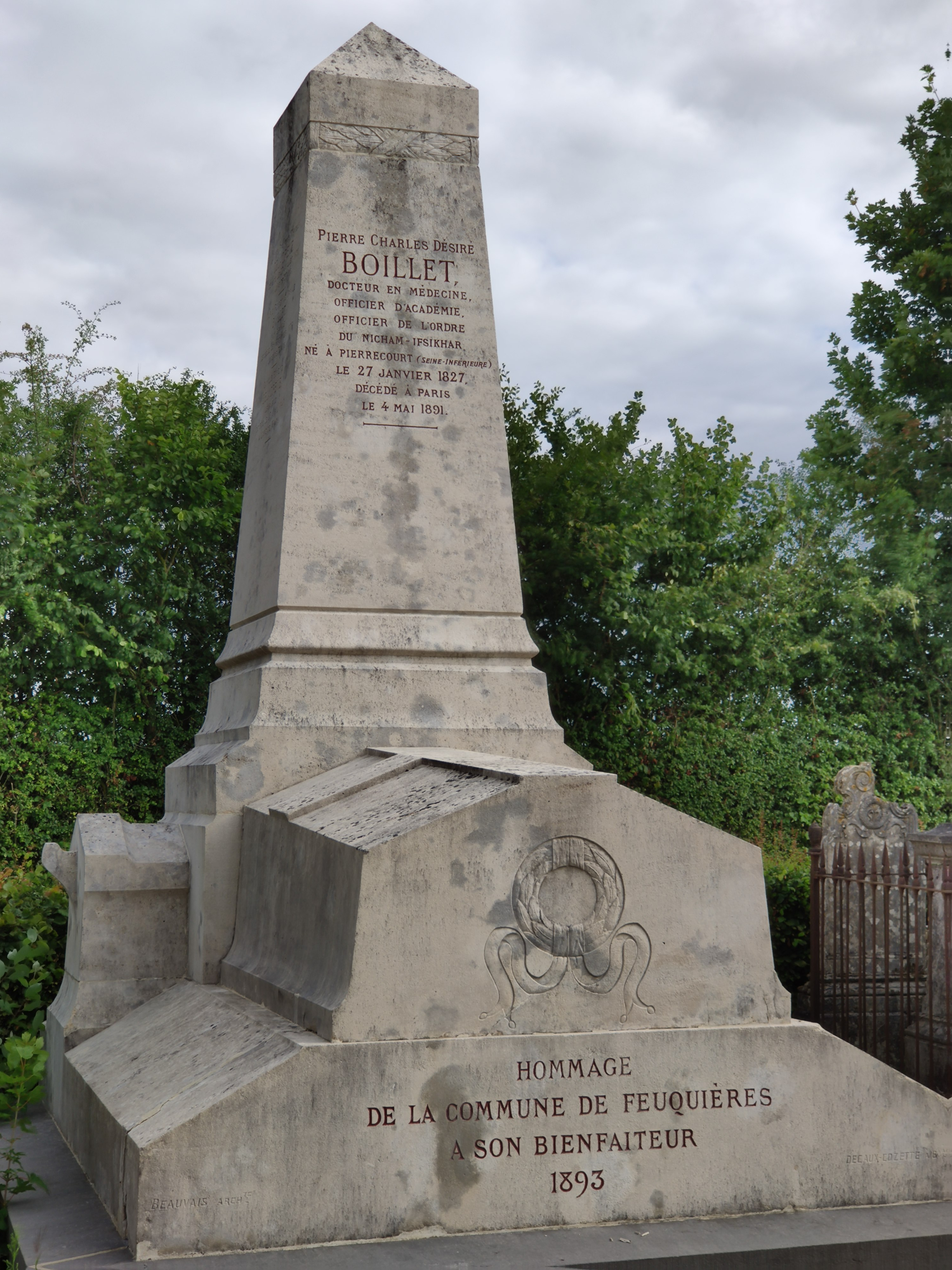 Feuquières (Oise) : Monument à Pierre Charles Désiré Boillet (1827-1891), "bienfaiteur de la commune", au cimetière communal.